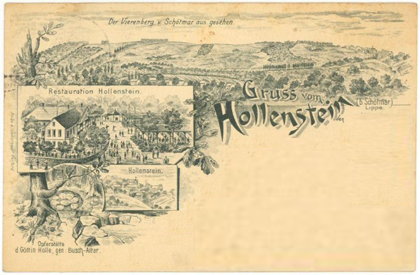 Ansichtskarte Hollenstein und Vierenberg, heute zu Bad Salzuflen im Kreis Lippe in Nordrhein-Westfalen gehörend